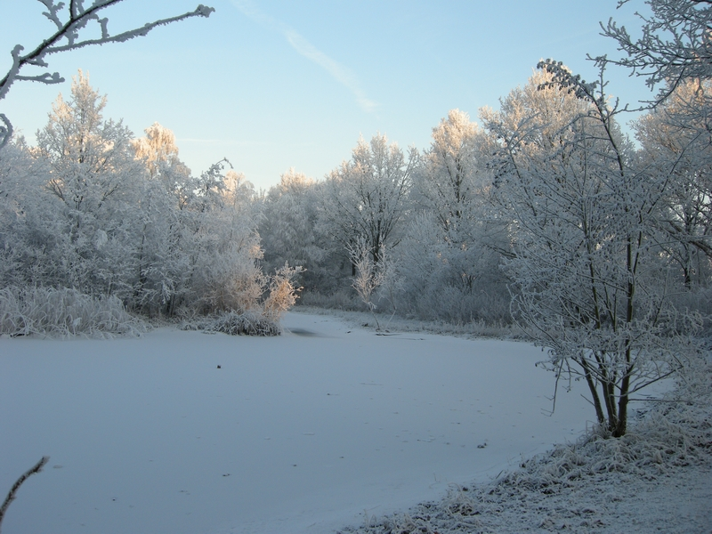 Winterwonder De Gorzen Ridderkerk